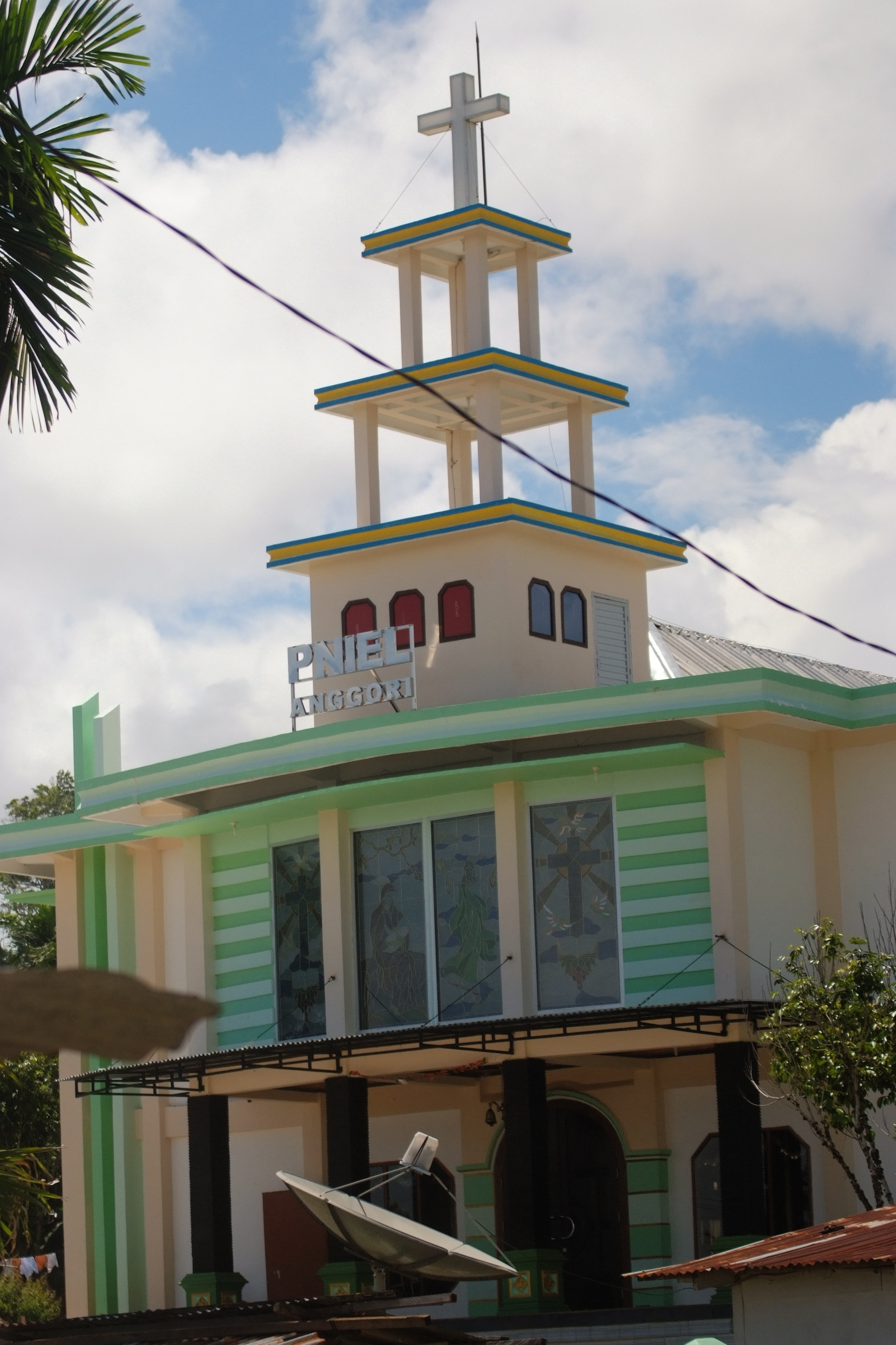 Gereja GKI Pniel di Kampung Anggori Manokwari Papua Barat. Arsitektur yang unik gabungan antara menara dan bangunan gedung.